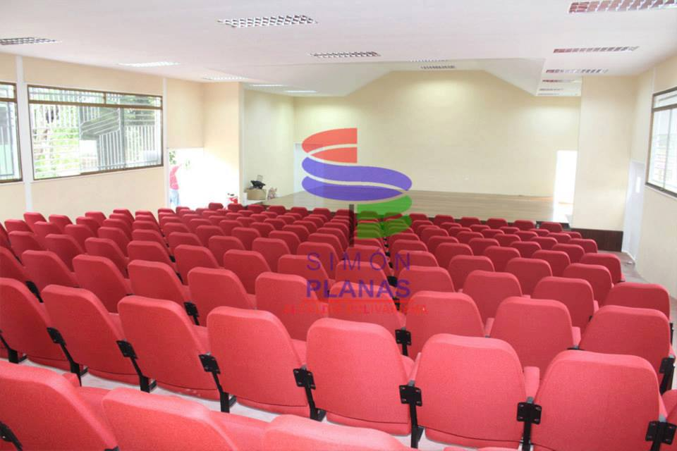 M.SIMON PLANAS